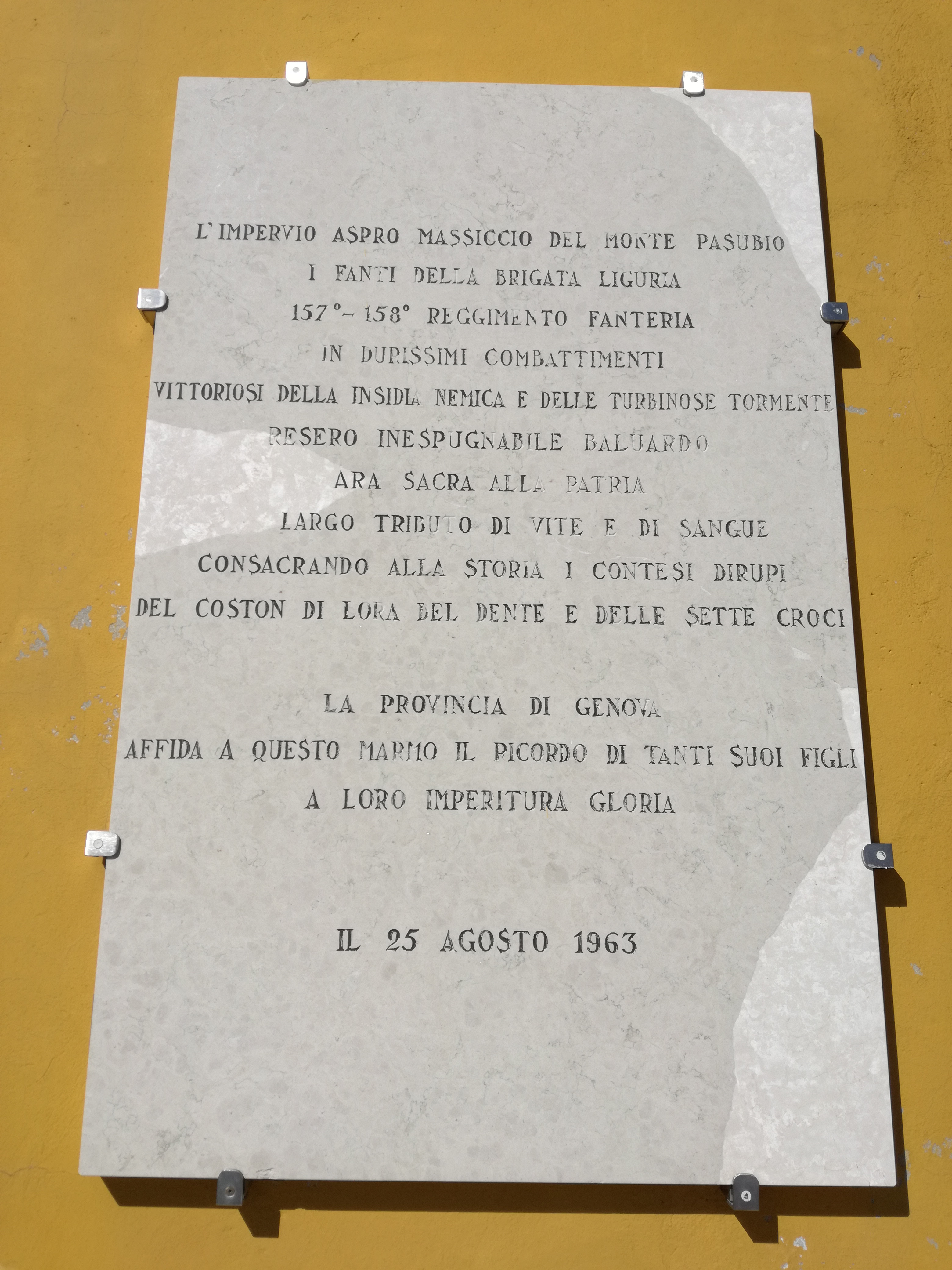 Gedenktafel für die Infanterie-Brigade Liguria - Außenwand Rifugio Achille Papa